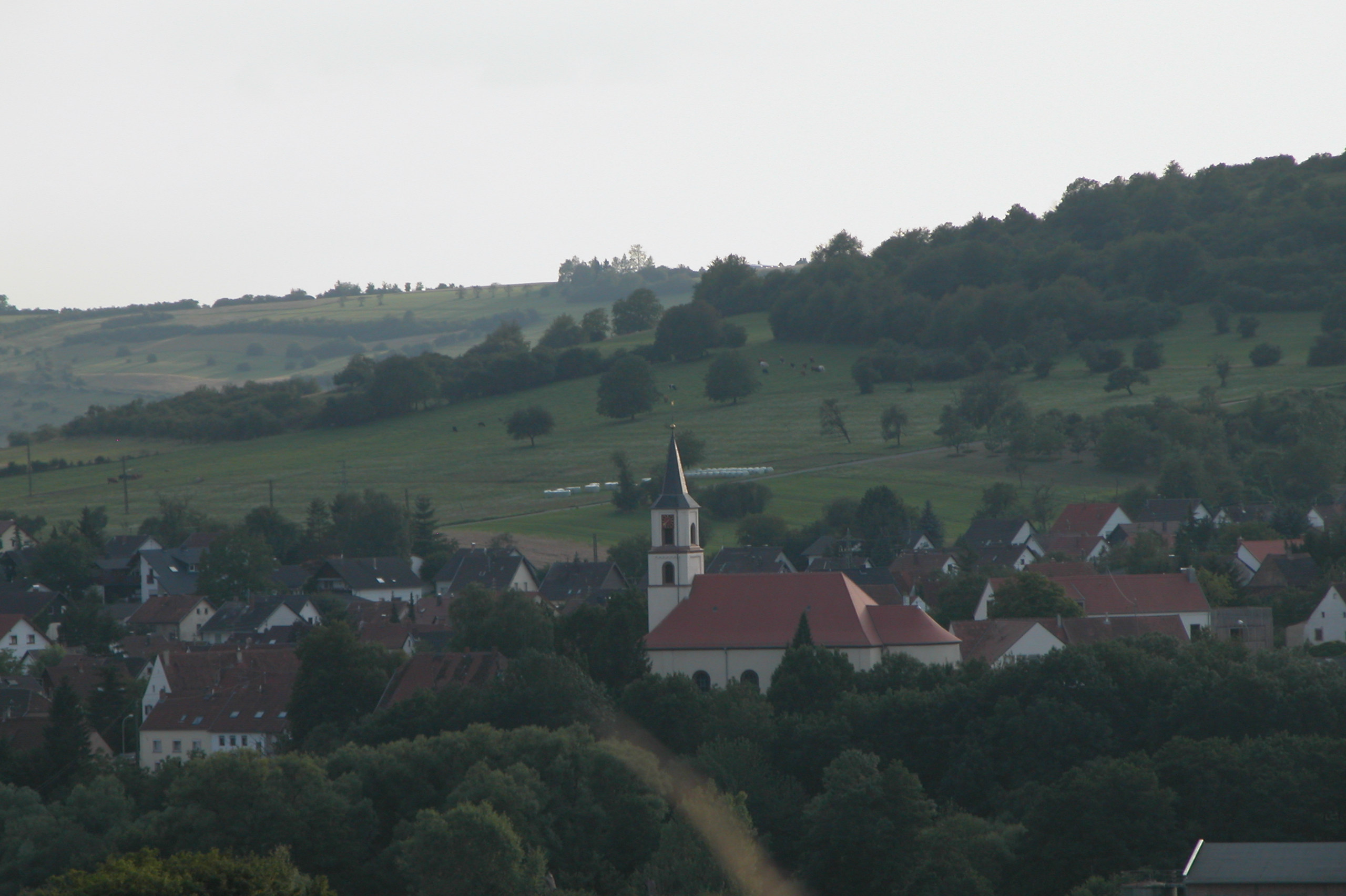 Church, Gersheim, Germany